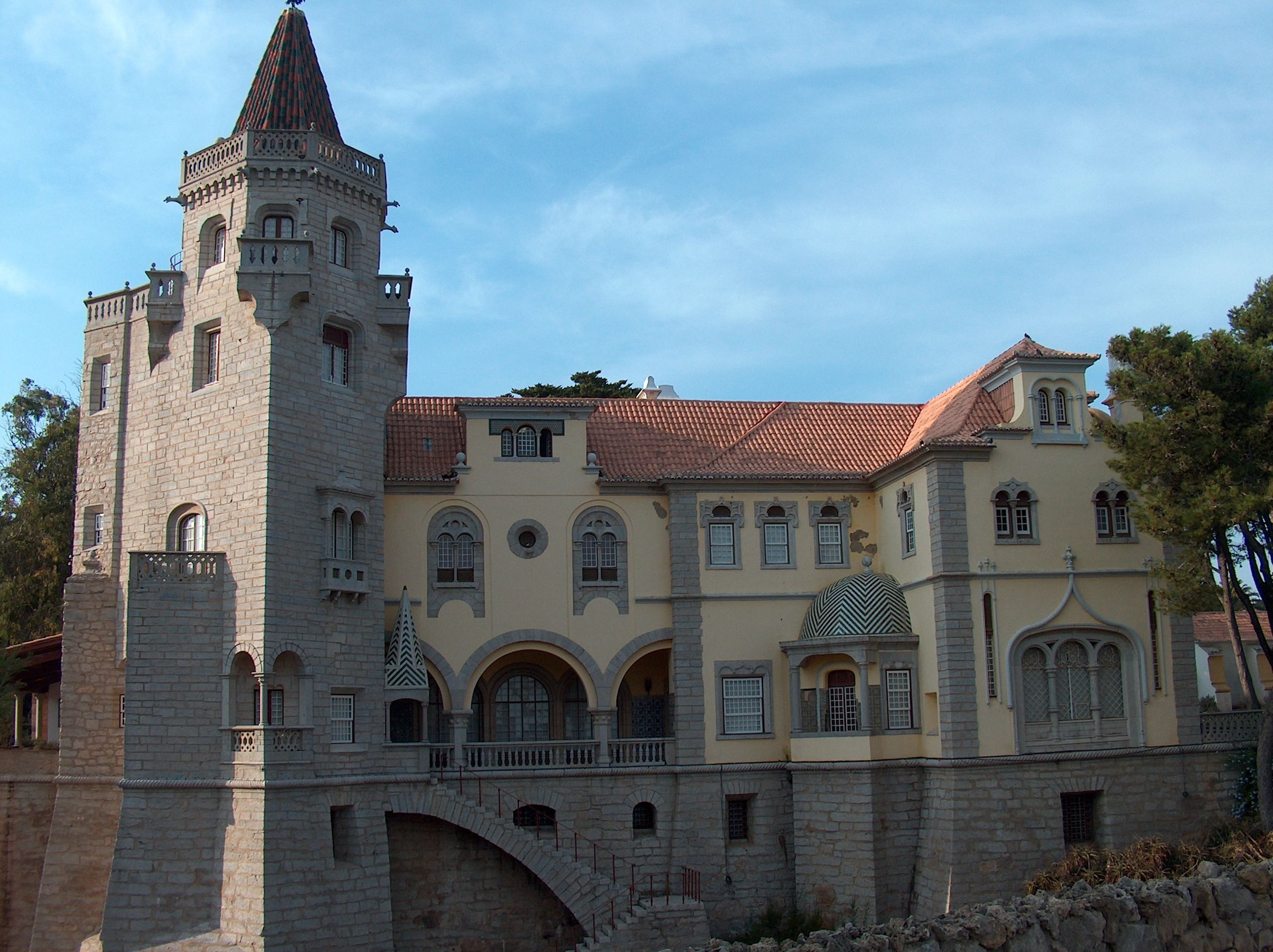 Palácio dos Condes de Castro Guimarães ou Torre de São Sebastião This monument is classified as Imóvel de Interesse Público. This building is classified as Imóvel de Interesse Público. This file was uploaded for Wiki Loves Monuments in Portugal with the unique identifier 74738.